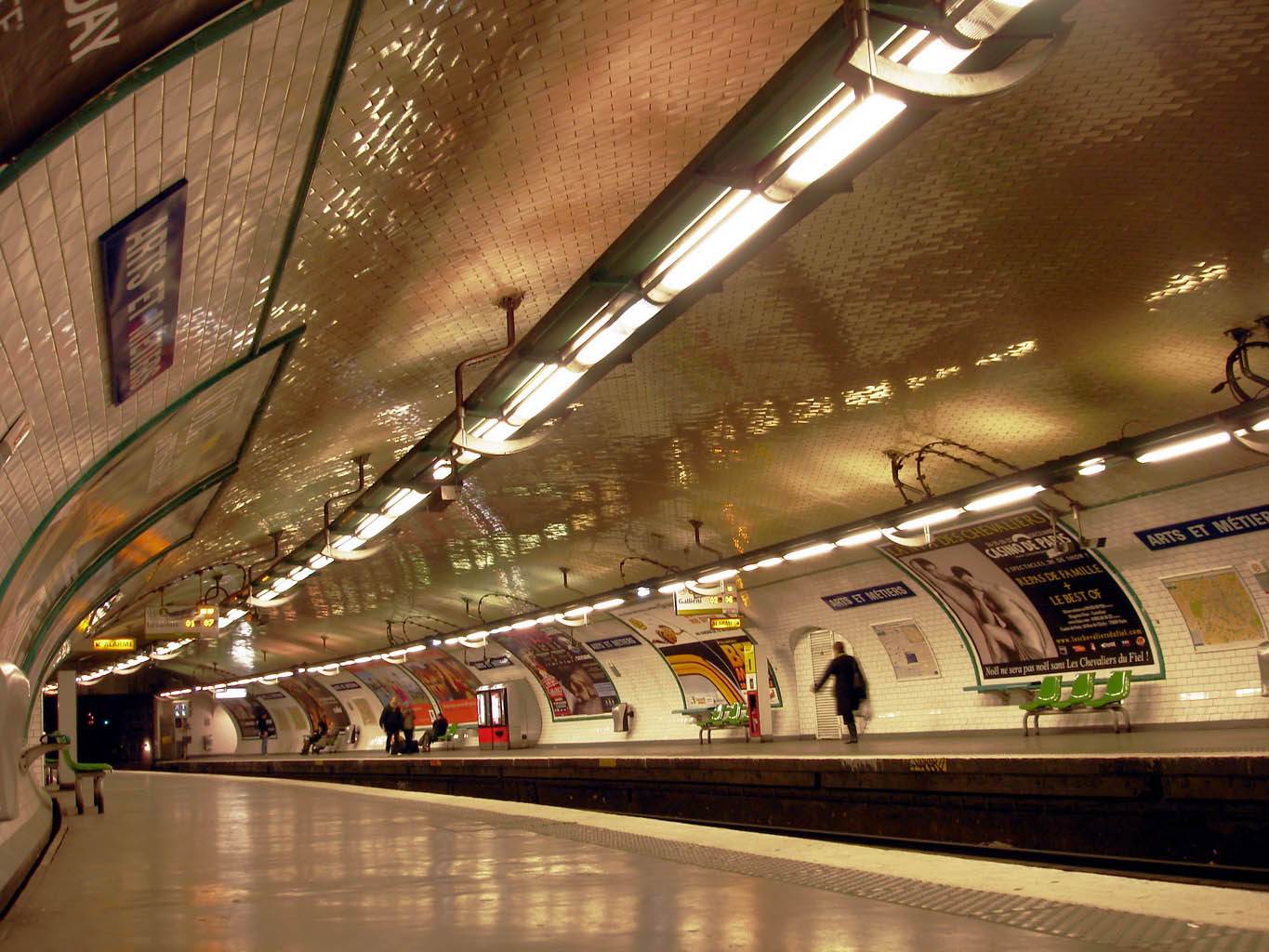 Métro de Paris (France) - ligne 3 - Station Arts et Métiers